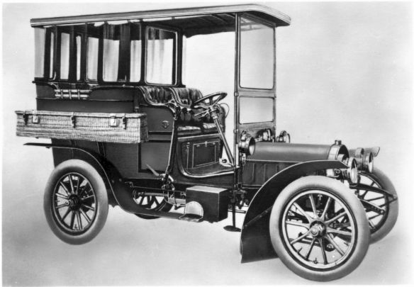 Cudell 35/40 PS "Phönix". Die Werkaufnahme zeigt ein Tonneau mit Heckeinstieg, abnehmbarem Winterdach unde seitlichen Transportkörben. Dieser Oberklassewagen leistete 45 PS. Er war eine Eigenentwicklung der Cudell Motor Compagnie m.b.H. in Aachen mit einem 6,1 Liter Vierzylindermotor, ohv-Ventilsteuerung und fünffach gelagerter Kurbelwelle. Seine moderne konstruktion erregte nach der Präsentation am Berliner Automobilsalon 1905 Aufsehen in der Fachwelt.